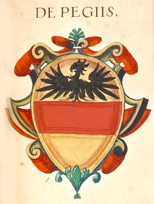 Brasão Pecchio - Pectis - Pezziis - Pegiis - Petii de Milão, com ramos na Toscana, Veneza e no Trentino (Sporminore, Cressino, Dercolo)